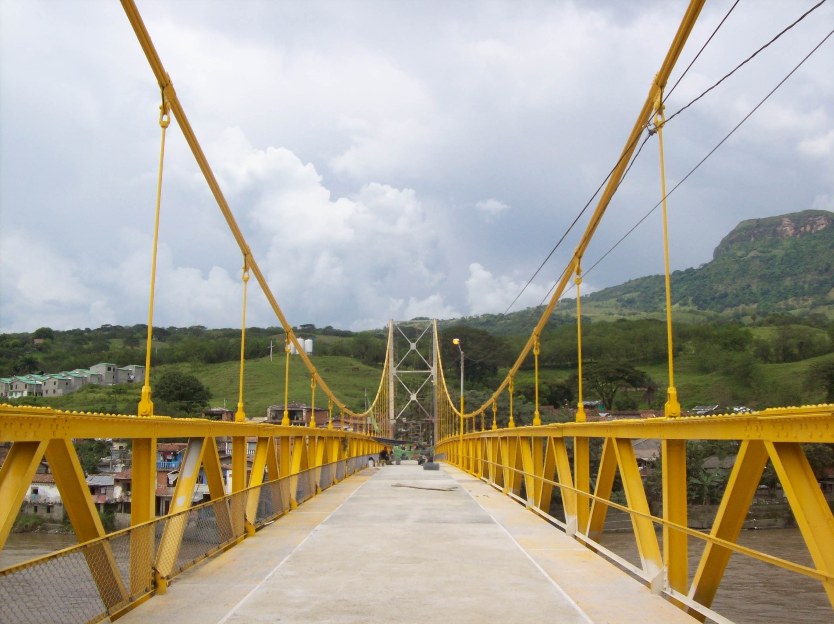 Puente sobre el Río Cauca en La Pintada, Antioquia.